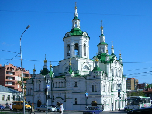 La preĝejo de la Savanto (Tjumeno, Rusio) Спасская церковь на перекрёстке улиц Ленина и Челюскинцев в Тюмени.